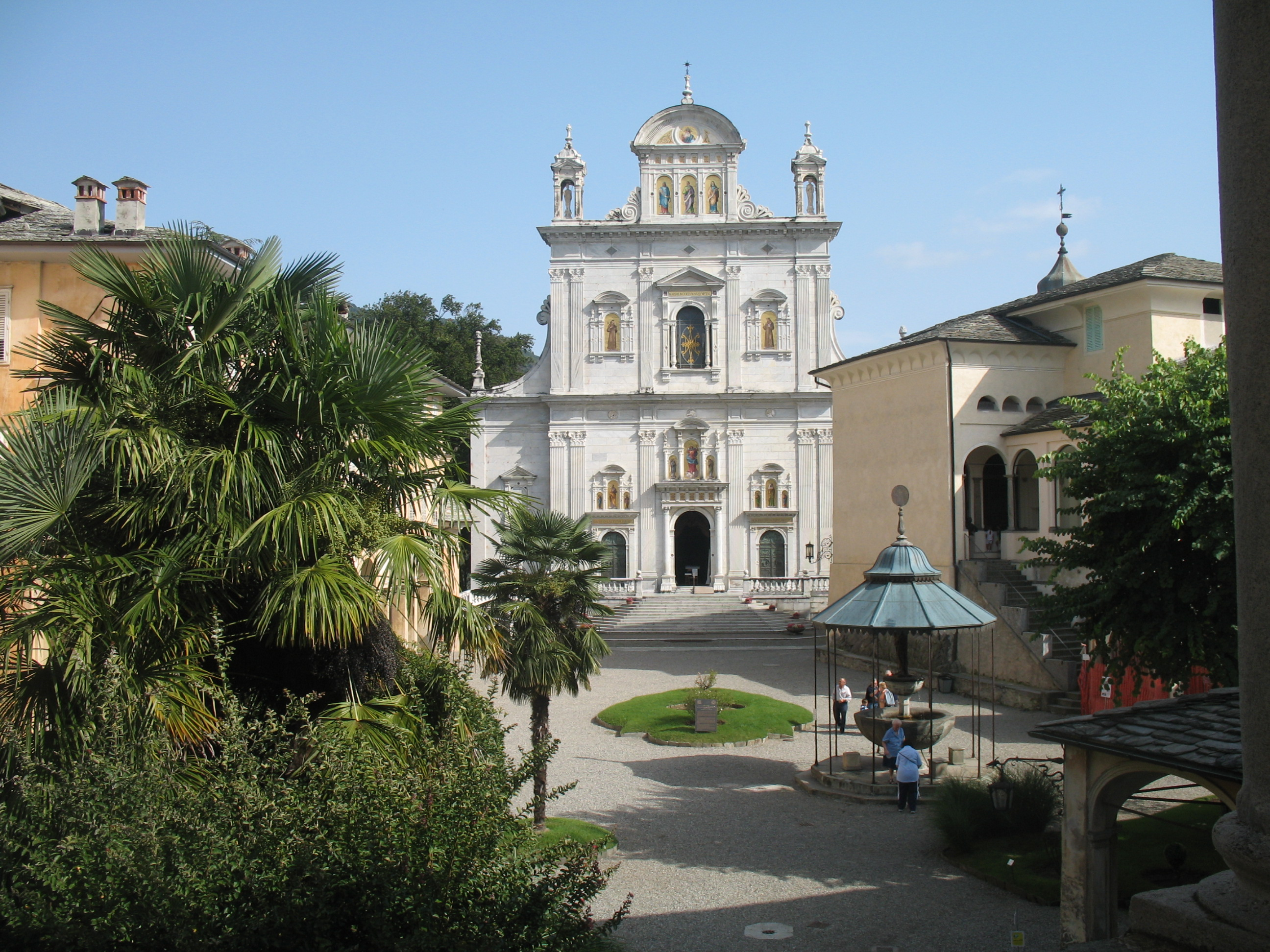 Sacro Monte di Varallo, Vercelli, Italia.